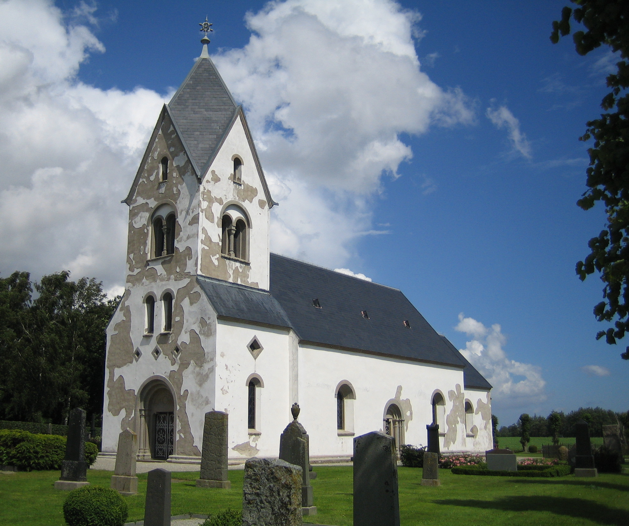 Östra Herrestads kyrka.